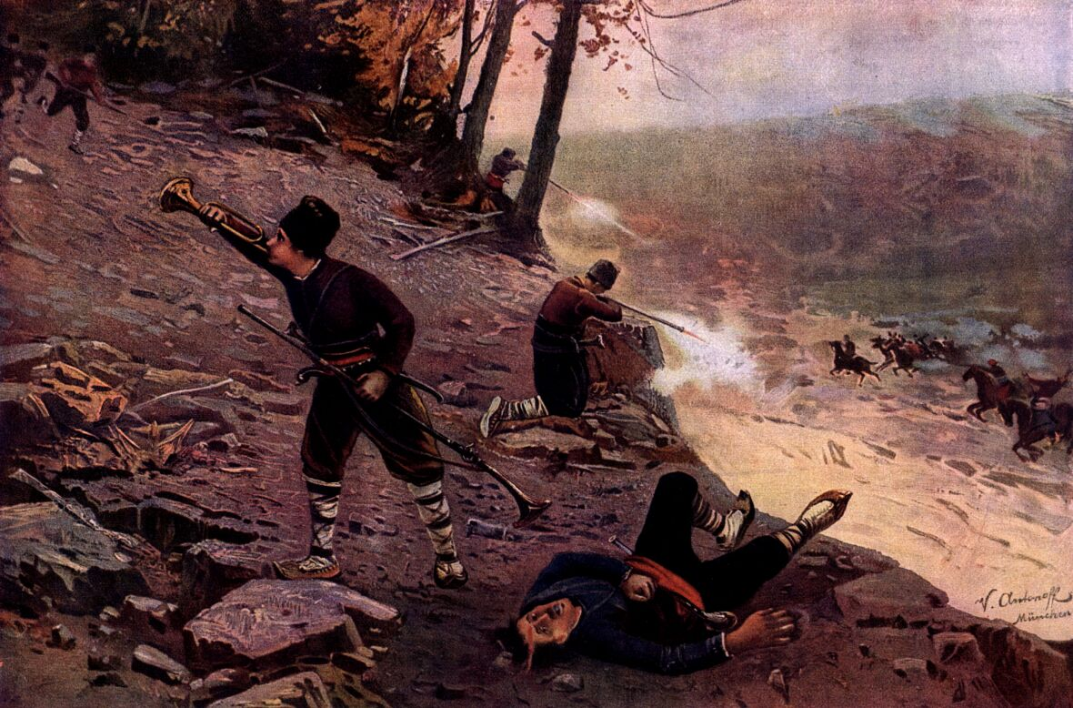 Bulgarische Aufständische im Kampf mit einer türkischen Schar (im Jahre 1876)